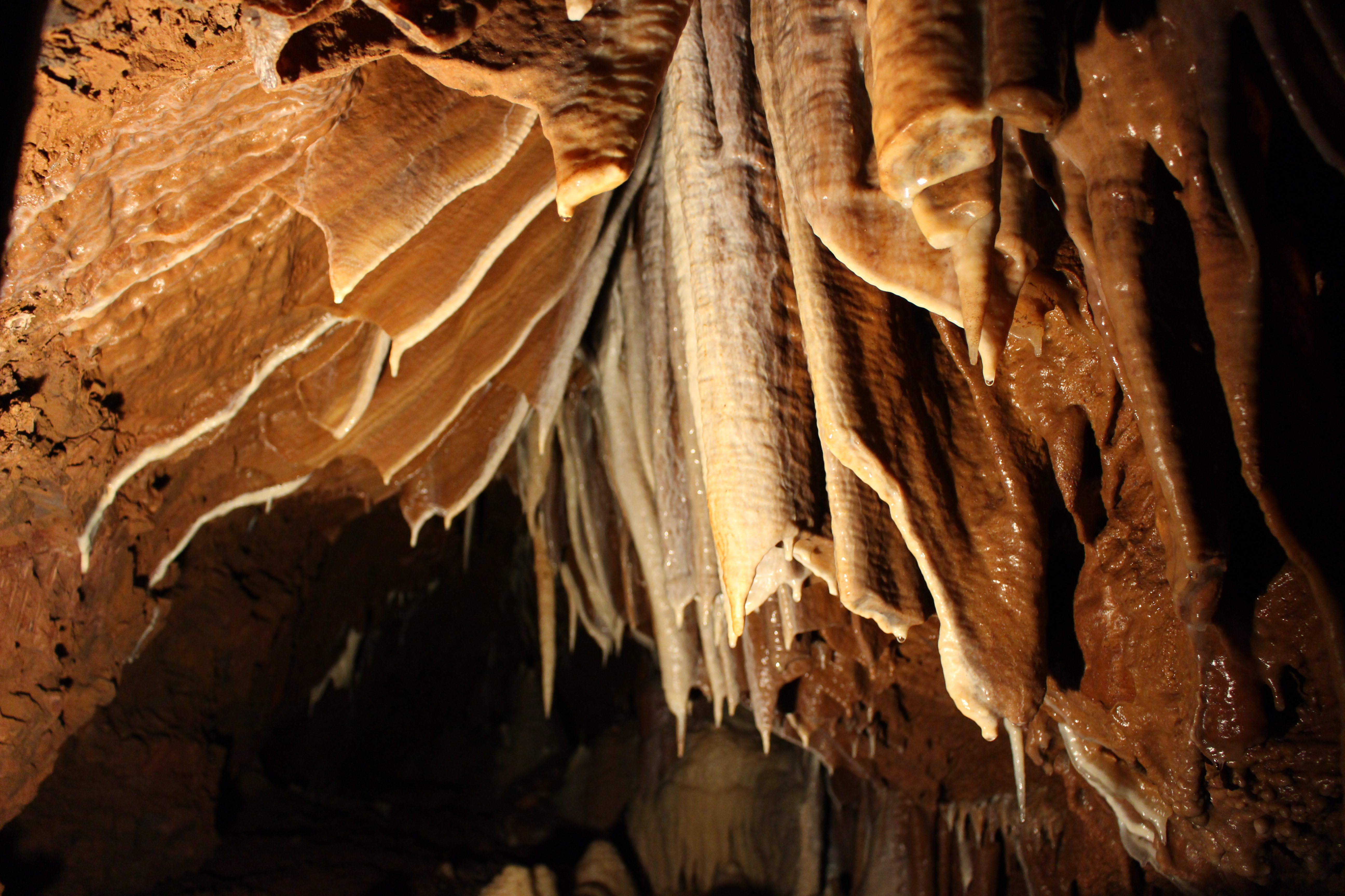 Králova jeskyně, vrch Květnice, obec Tišnov, okres Brno-venkov, Jihomoravský kraj